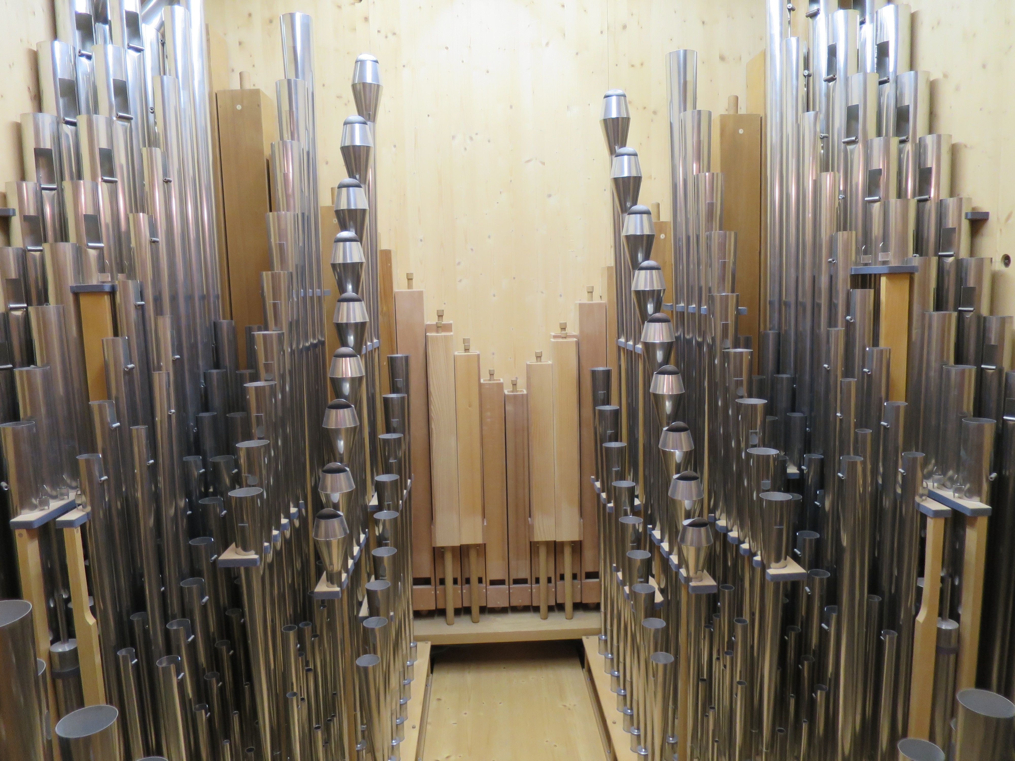 Reformierte Kirche Wädenswil - Blick ins Schwellwerk